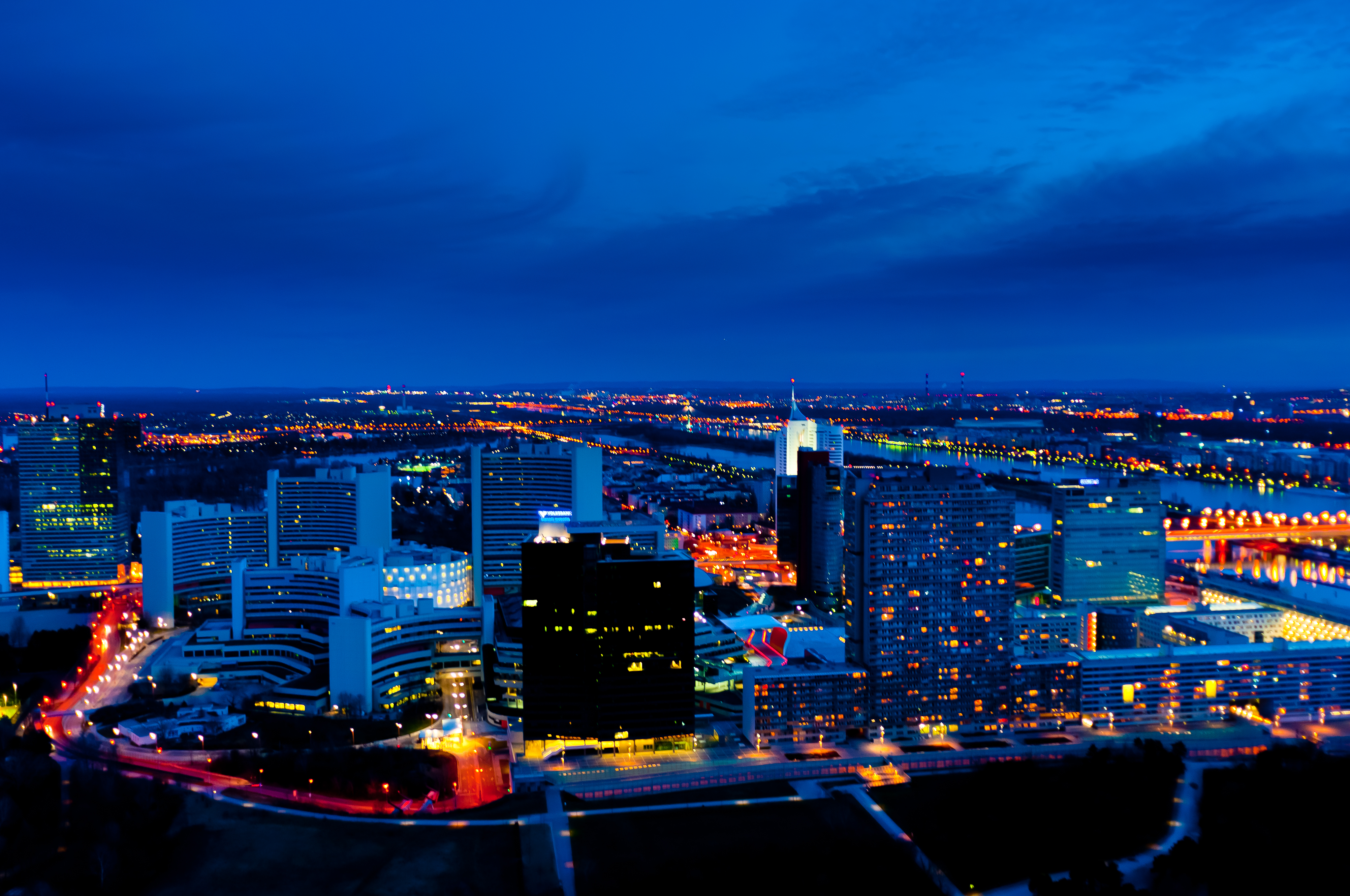 Vienna